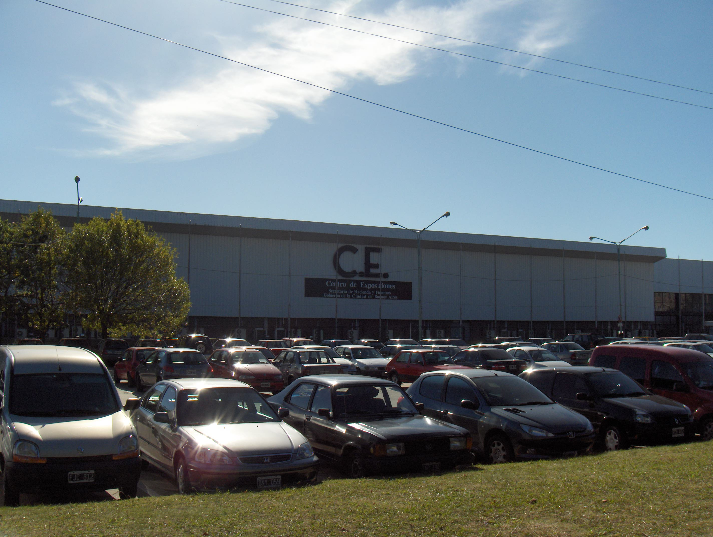 Ex Centro de Exposiciones de la Ciudad de Buenos Aires, inaugurado en 1970 y demolido en el 2016.